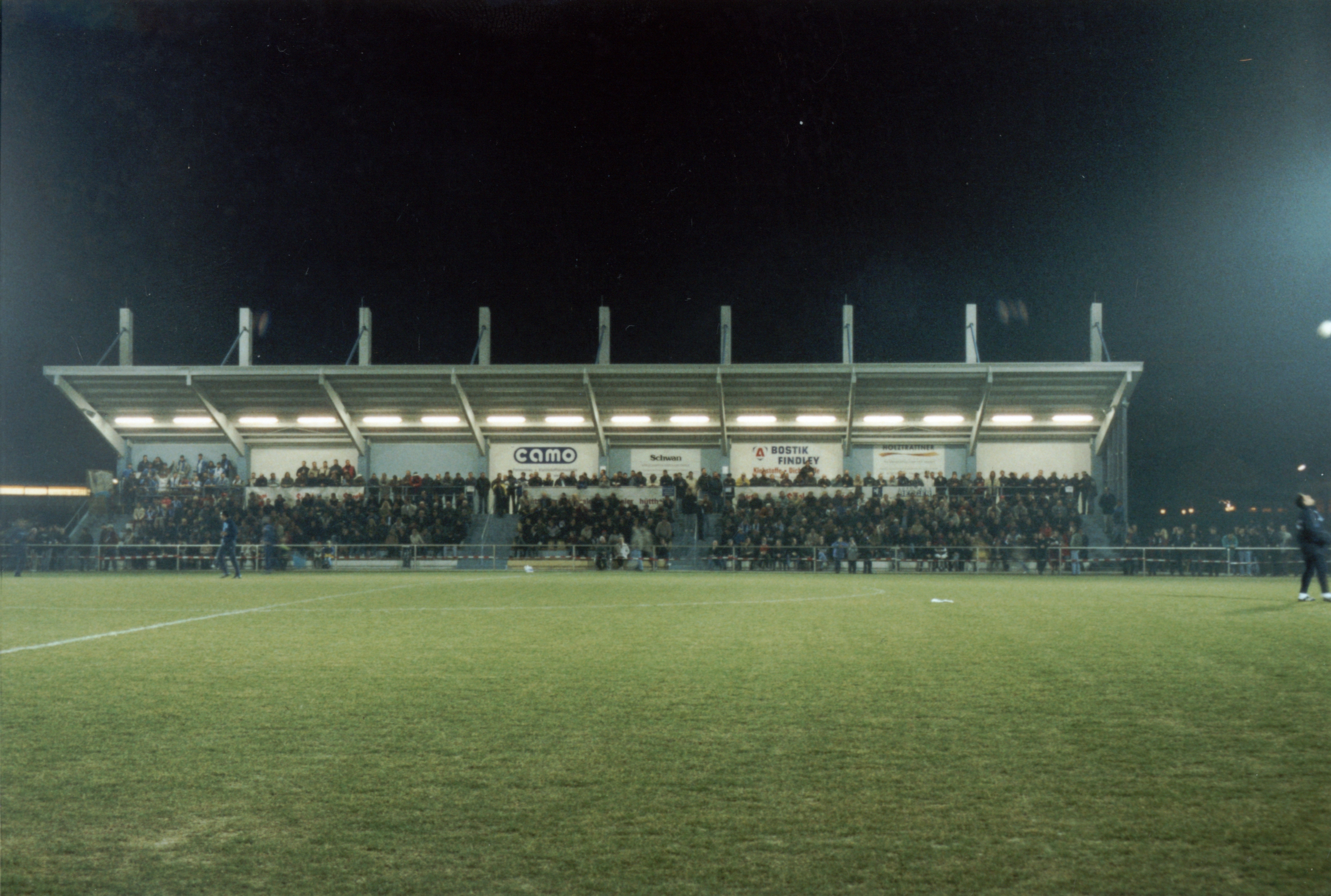 Stadion vor der Au